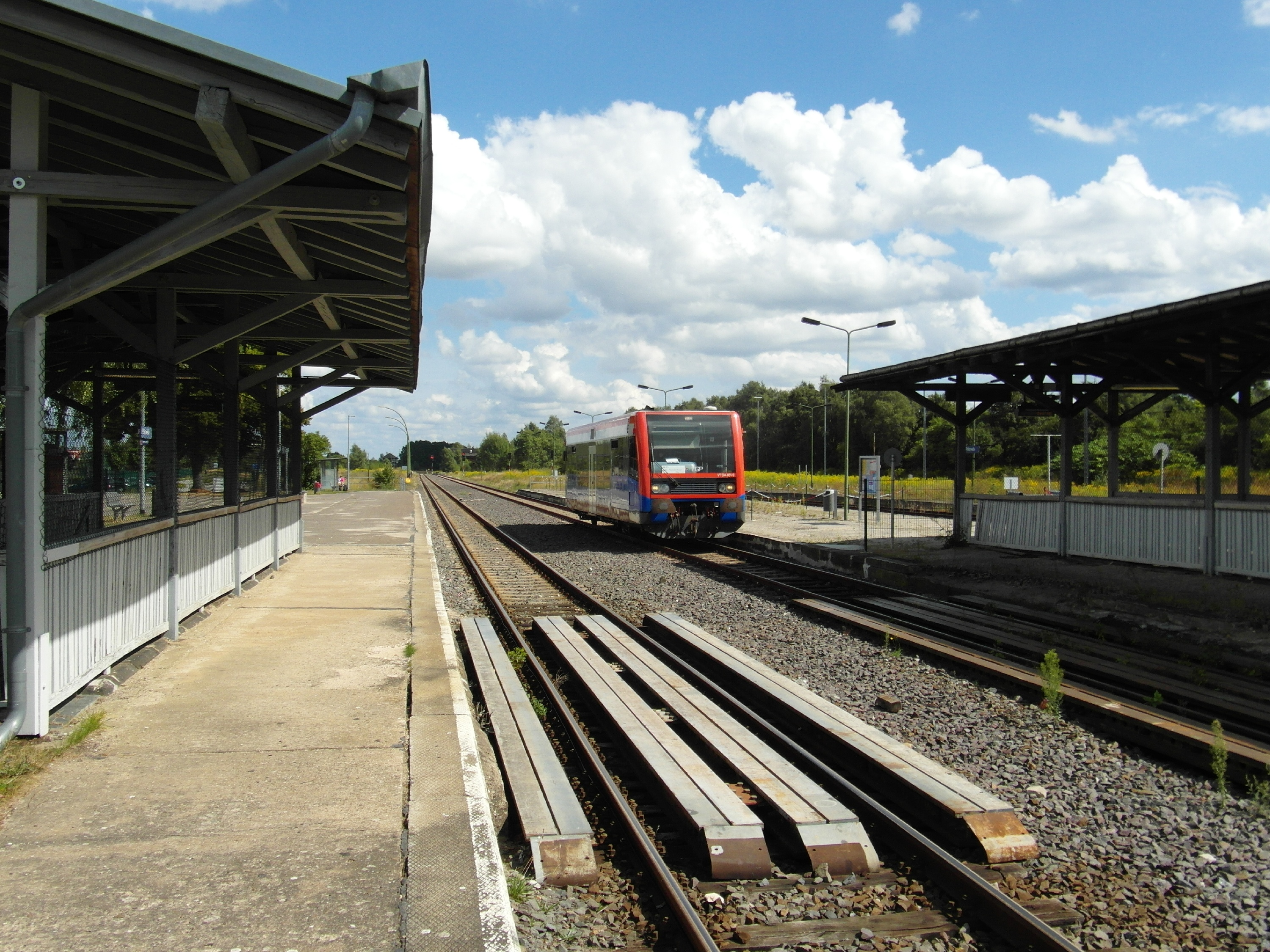 Bahnhof Pritzwalk im Landkreis Prignitz in Brandenburg